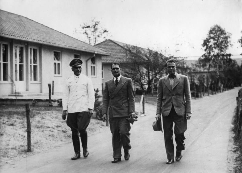 Besuch im Olympischen Dorf, Hess, Fürstner, Leitgen Rudolf Hess im Olympischen Dorf Der Stellvertreter des Führers Rudolf Hess besichtigte heute vormittag in Begleitung seines persönlichen Adjutanten Leitgen das Olympische Dorf U.B.z.: v.l.n.r. Hauptmann Fürstner, Kommandant des Olympischen Dorfes, Rudolf Hess, Alfred Leitgen Phot. Hoffmann 7193-36 Abgebildete Personen: Heß, Rudolf: Stellvertreter Hitlers als Führer der NSDAP, Kanzleileiter, Deutschland (GND 11855039X) Leitgen, Alfred: Reichsamtsleiter, Adjutant von Rudolf Hess, Deutschland Fürstner, Wolfgang: Hauptmann, Kommandant des Olympischen Dorfes 1936, Deutschland